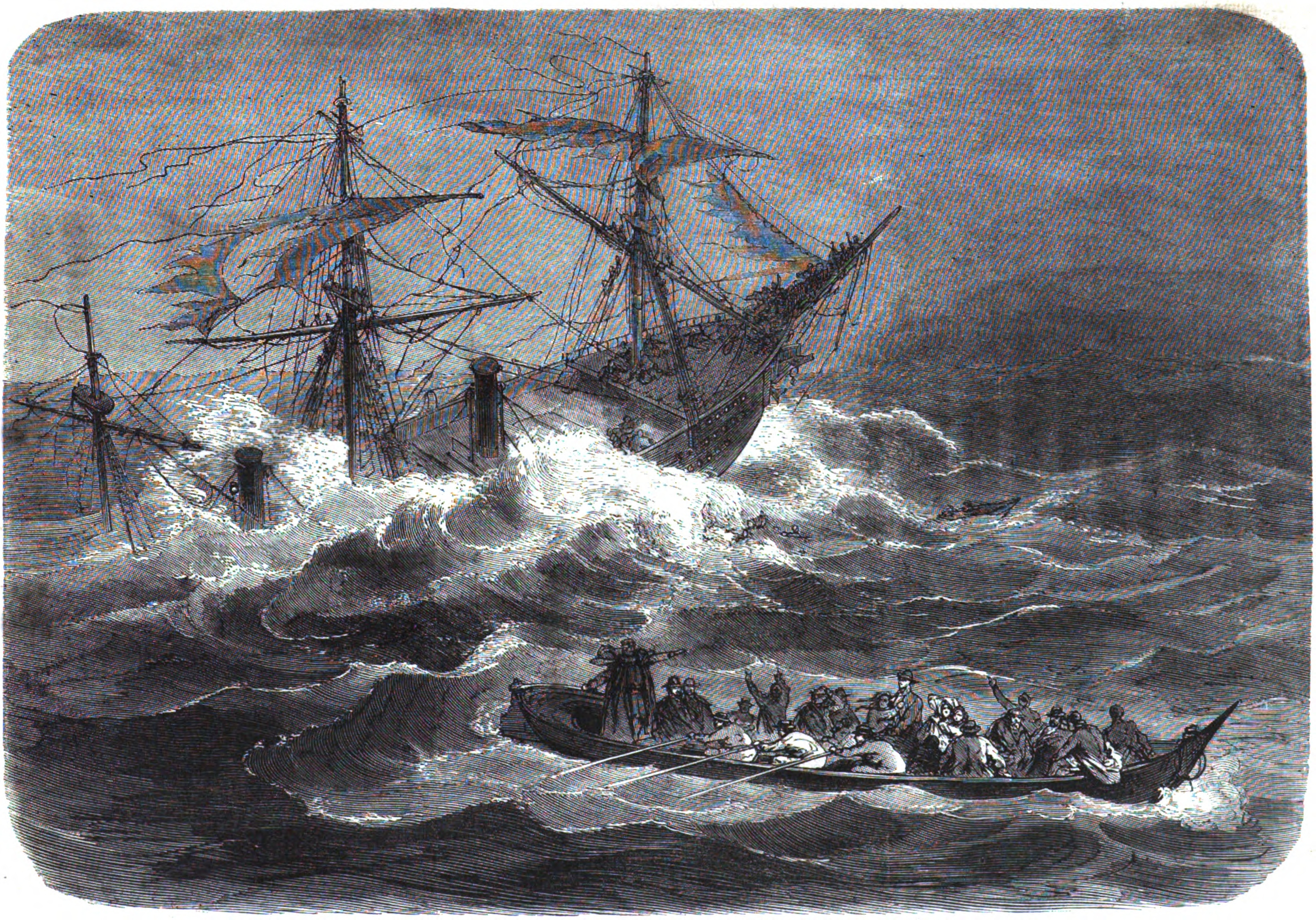 Untergang des Dampfschiffs London am 11.01.1866 im Golf von Biskaya.